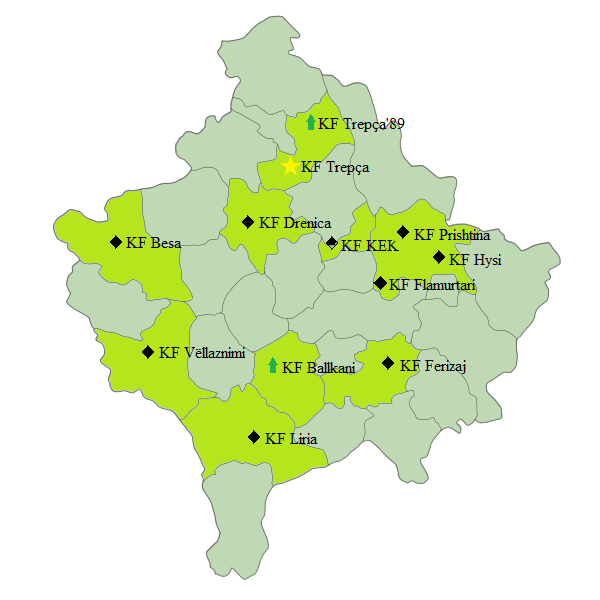 Raiffeisen Superliga Saison 10/11